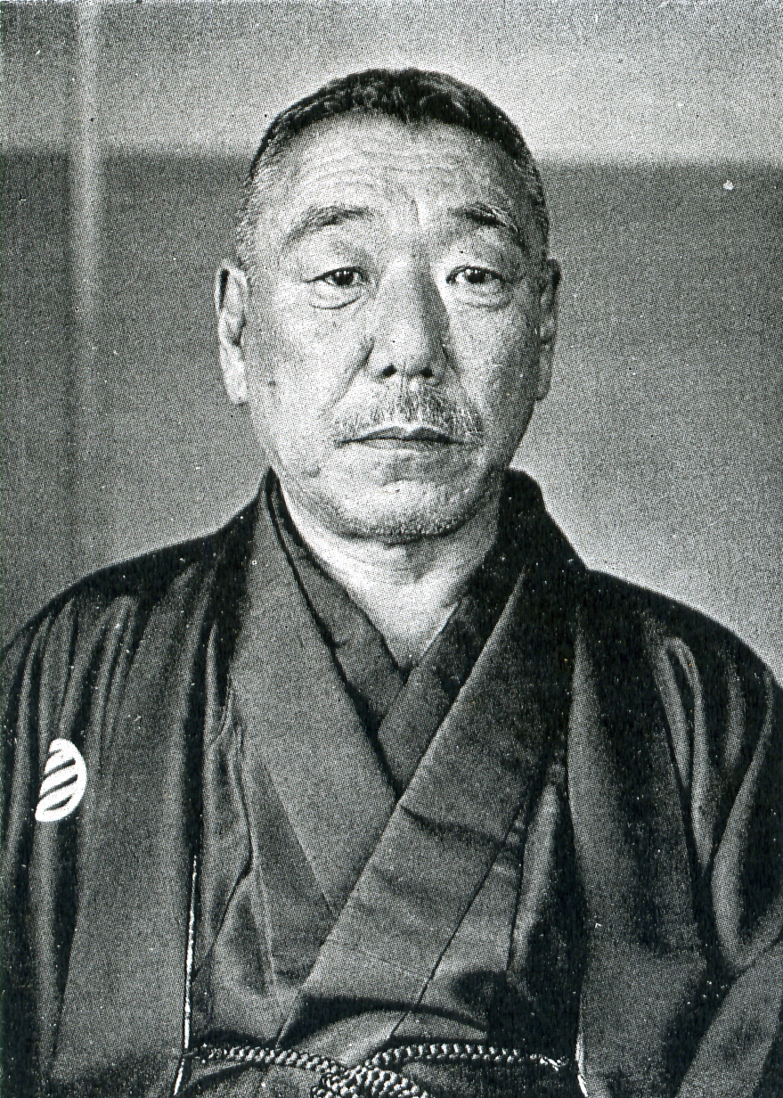 この写真は、広岡宇一郎（1867-1941）の写真です。